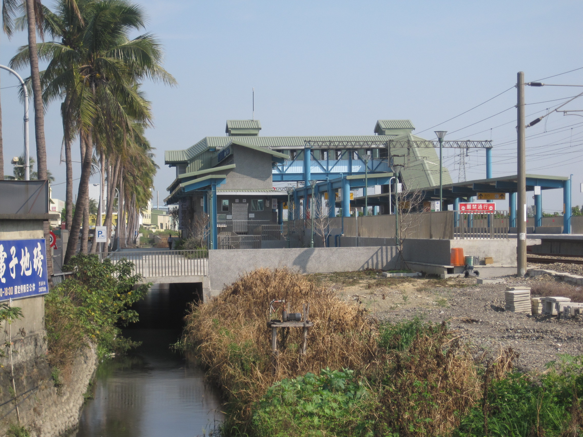 臺南仁德車站